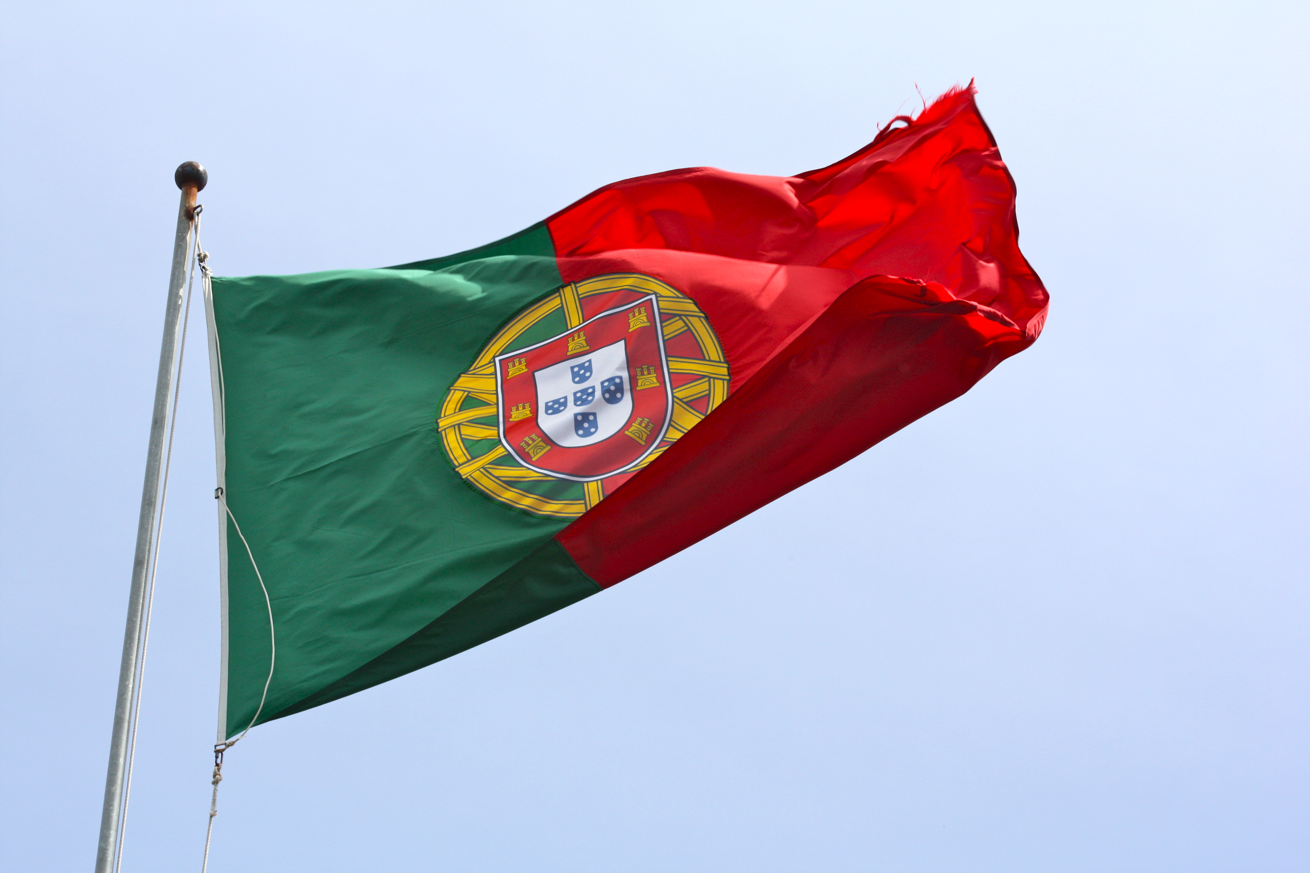 Sintras - 091